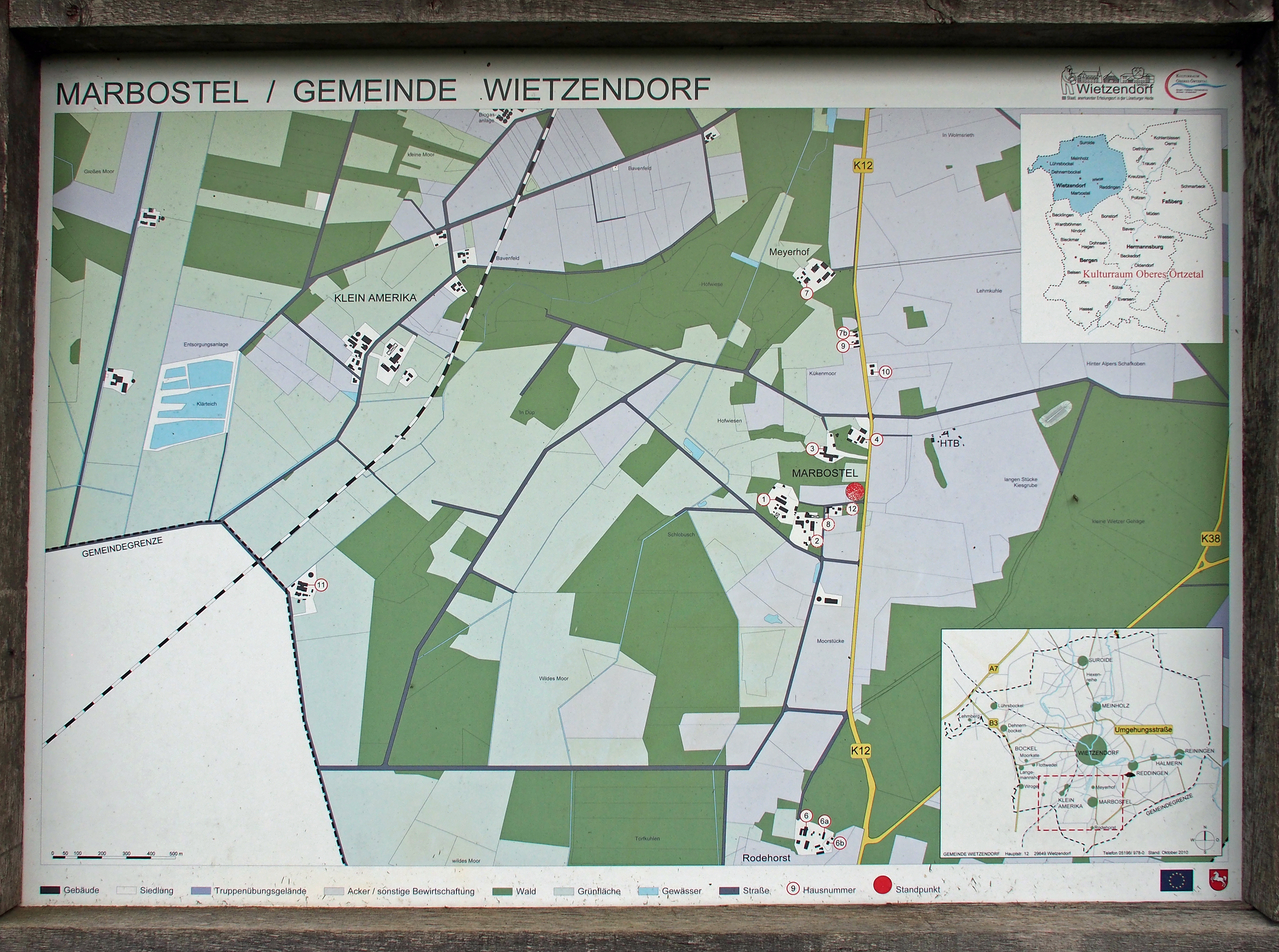 Karte von Marbostel, Ortsteil von Wietzendorf. Foto der öffentlich ausgestellten Infotafel in Marbostel.